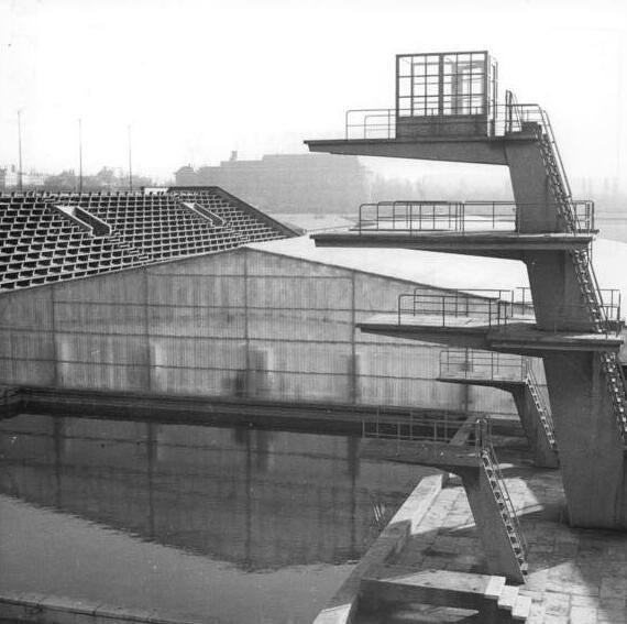 Zentralbild-Köhler Tre-Ri. 17.2.1961 Training bis spät abends möglich "Wasserratten" können nun auch im Winter ihrem geliebten Wassersport nachgehen, denn vor wenigen Tagen wurde die Überdachung des Leipziger Schwimmstadions beendet. Eine vorbildliche Neonbeleuchtungsanlage wird zur Zeit noch installiert und gewährleistet Training bis spät abends. Inzwischen nahmen auch unsere Schwimmer bereits das Training für die Europameisterschaften, die 1962 im gleichen Bad stattfinden, auf. UBz.: Blick auf das überdachte Schwimmstadion."